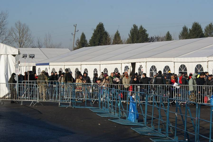 Med novoletnimi prazniki bo na nalogah dnevno več kot 650 pripadnikov in pripadnic Slovenske vojske.